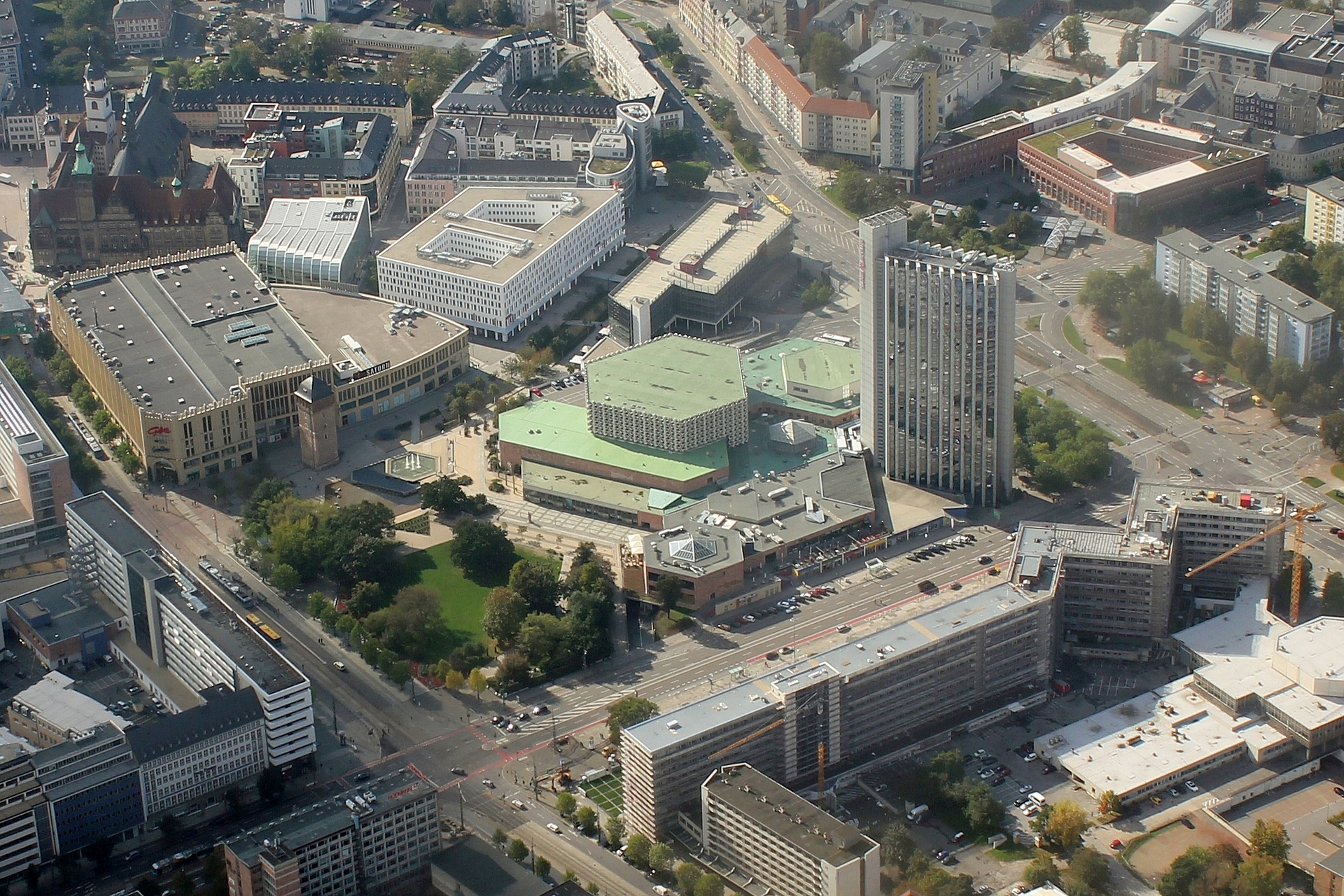 Die Stadthalle Chemnitz auf einer Luftaufnahme im Jahr 2014.